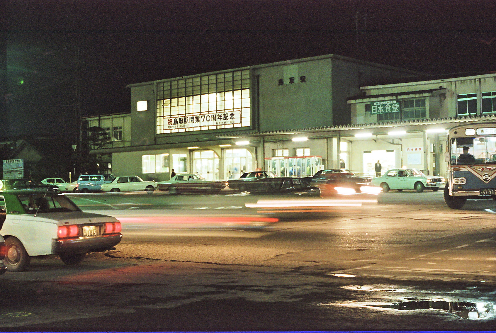 地上駅時代の山陰本線 鳥取駅